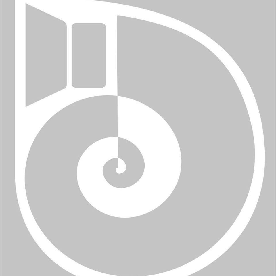 Csigahangláda LOGO szürke alap